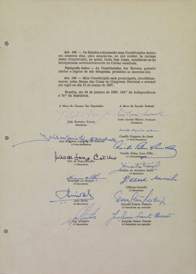 Página 73 da Constituição do Brasil de 1967.